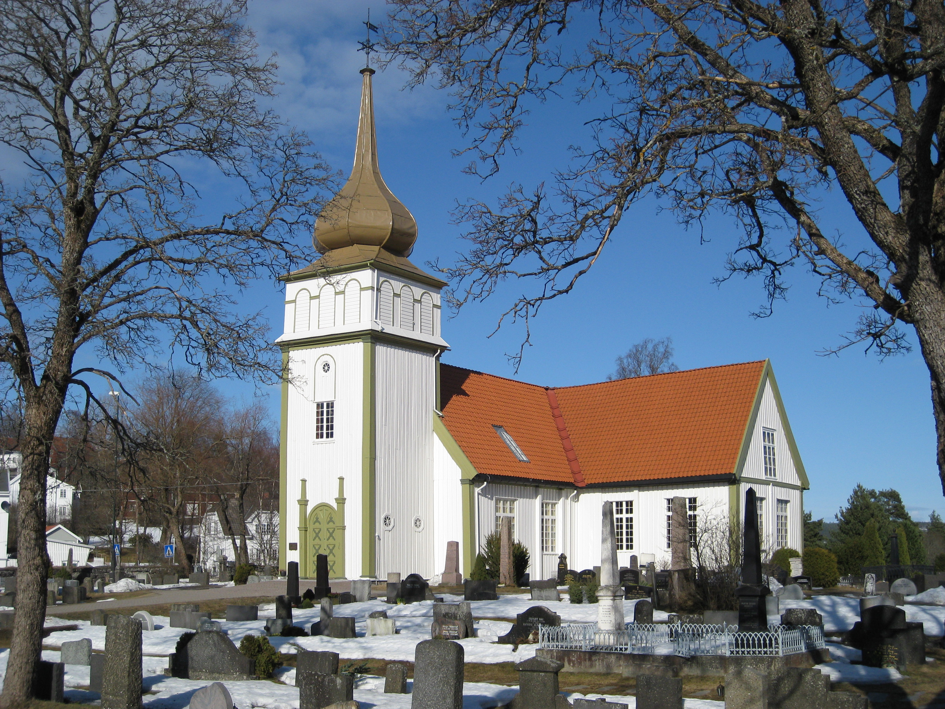 Vinger kirke i Kongsvinger. Bygget 1697-1699 som garnisonskirke og sognekirke. Grunnsteinen ble nedlagt 7. juni 1676 av kommandant og oberstløytnant Johan Nicolai Von Müllerup. Kirken ble vigslet den 6. januar 1699 av biskop Hans Rosing. Tårnet med løkkuppel ble for øvrig bygget i 1855.